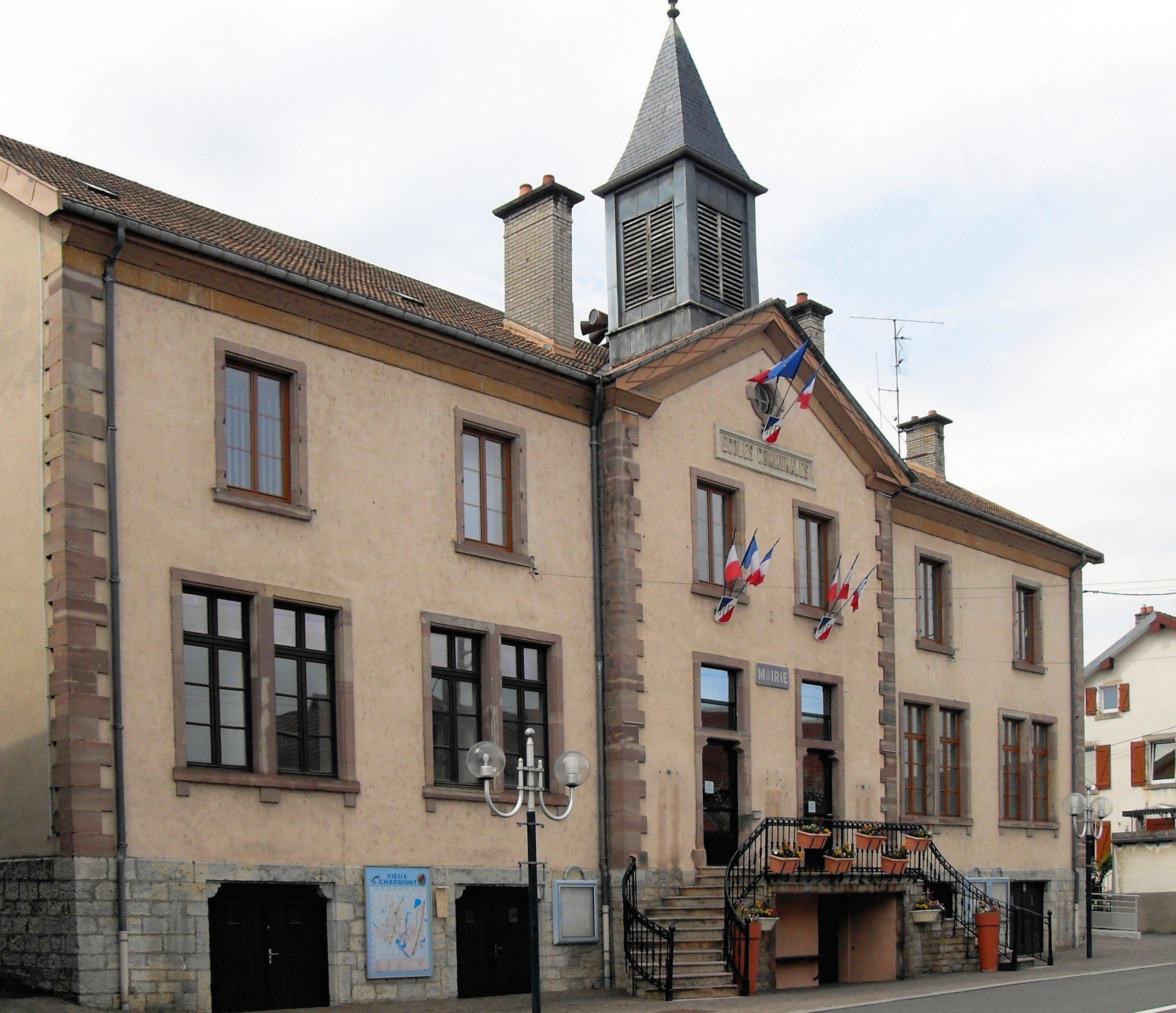 La mairie-école de Vieux-Charmont